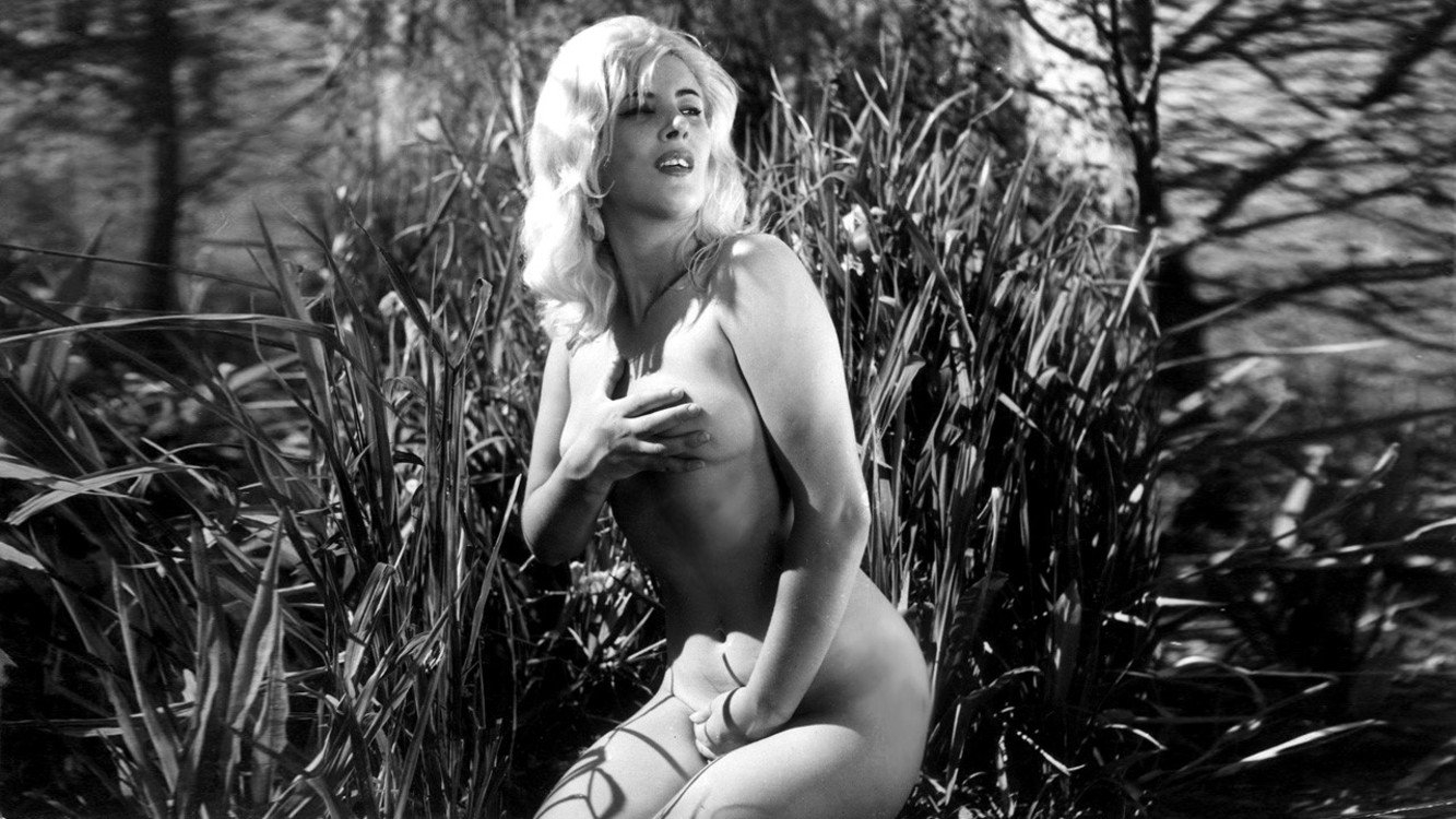 Libertad Leblanc en la película La flor de Irupé.